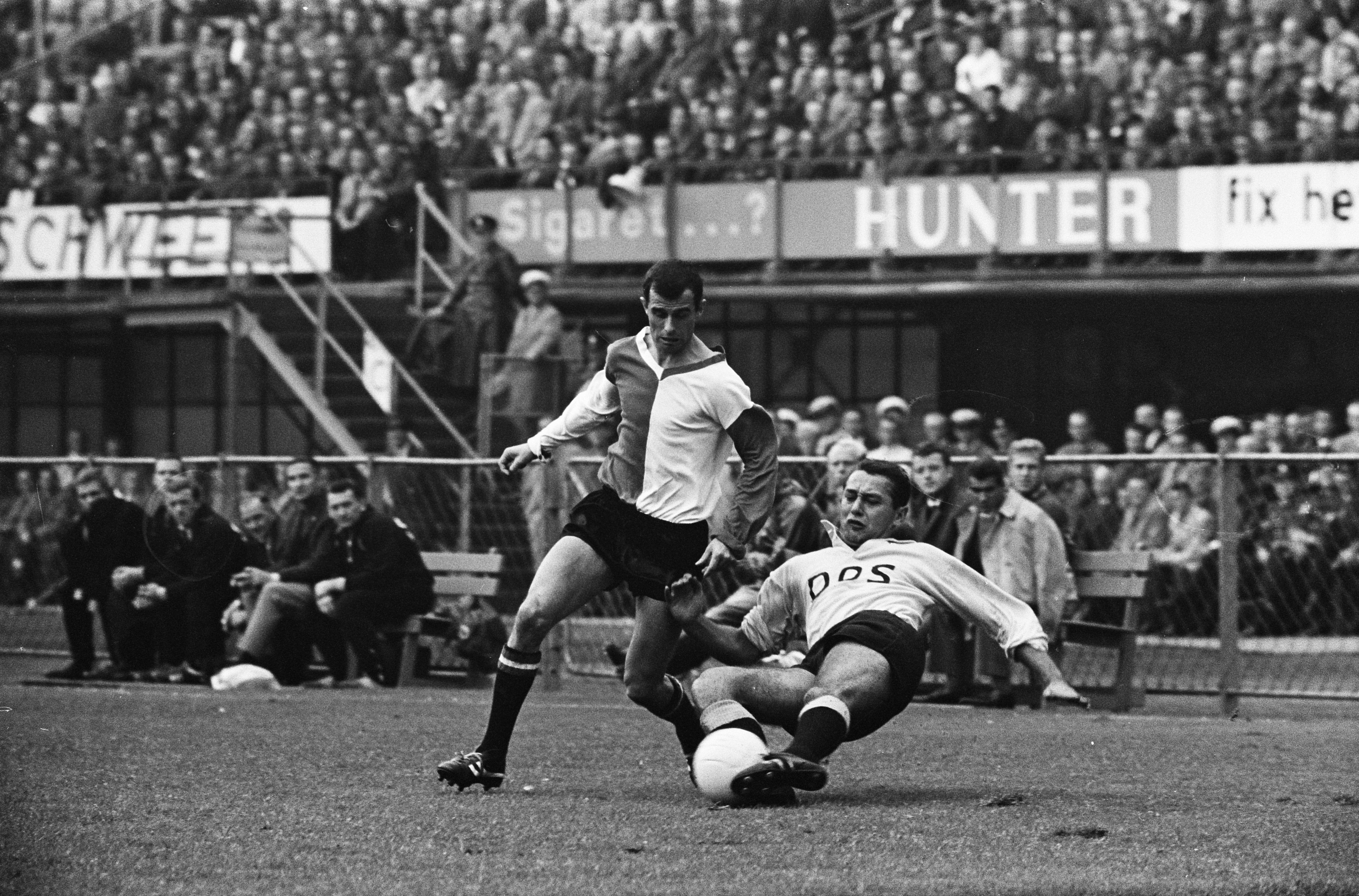 Collectie / Archief : Fotocollectie Anefo Reportage / Serie : [ onbekend ] Beschrijving : Feyenoord tegen DOS 4-2. Coen Moulijn in duel met Liptak van DOS Datum : 7 september 1963 Locatie : Rotterdam Trefwoorden : sport, voetbal Persoonsnaam : Lipták, Georgy, Moulijn, Coen Instellingsnaam : Feyenoord Fotograaf : Koch, Eric / Anefo Auteursrechthebbende : Nationaal Archief Materiaalsoort : Negatief (zwart/wit) Nummer archiefinventaris : bekijk toegang 2.24.01.05 Bestanddeelnummer : 915-5078